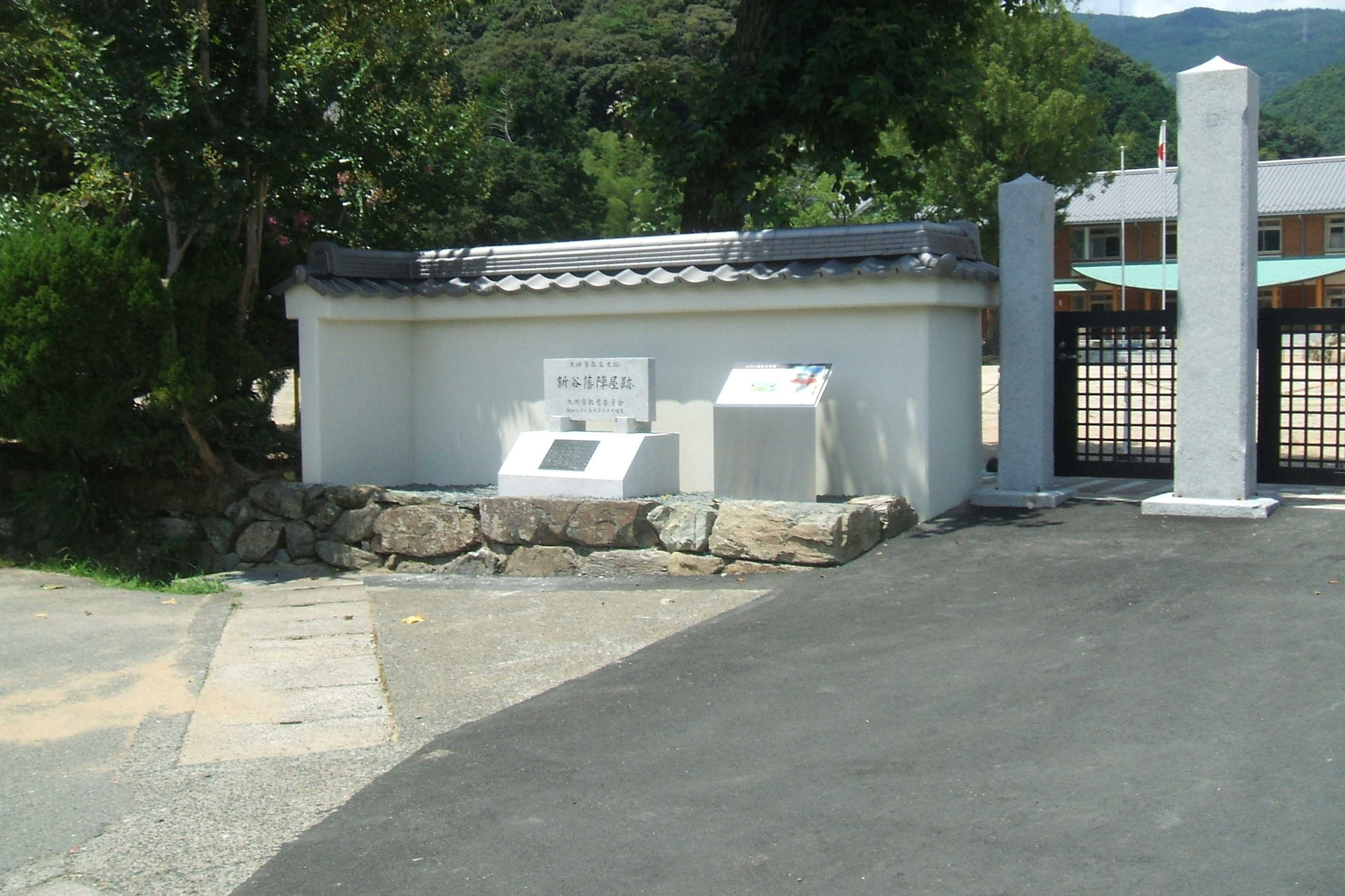 愛媛県大洲市新谷町にある旧新谷藩藩庁であった新谷陣屋の記念碑